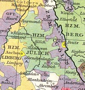 Karte des Herzogtums Jülich Sonstiges: Ausschnitt aus der Karte S. 38/39, "Deutschland zur Zeit der Reformation"